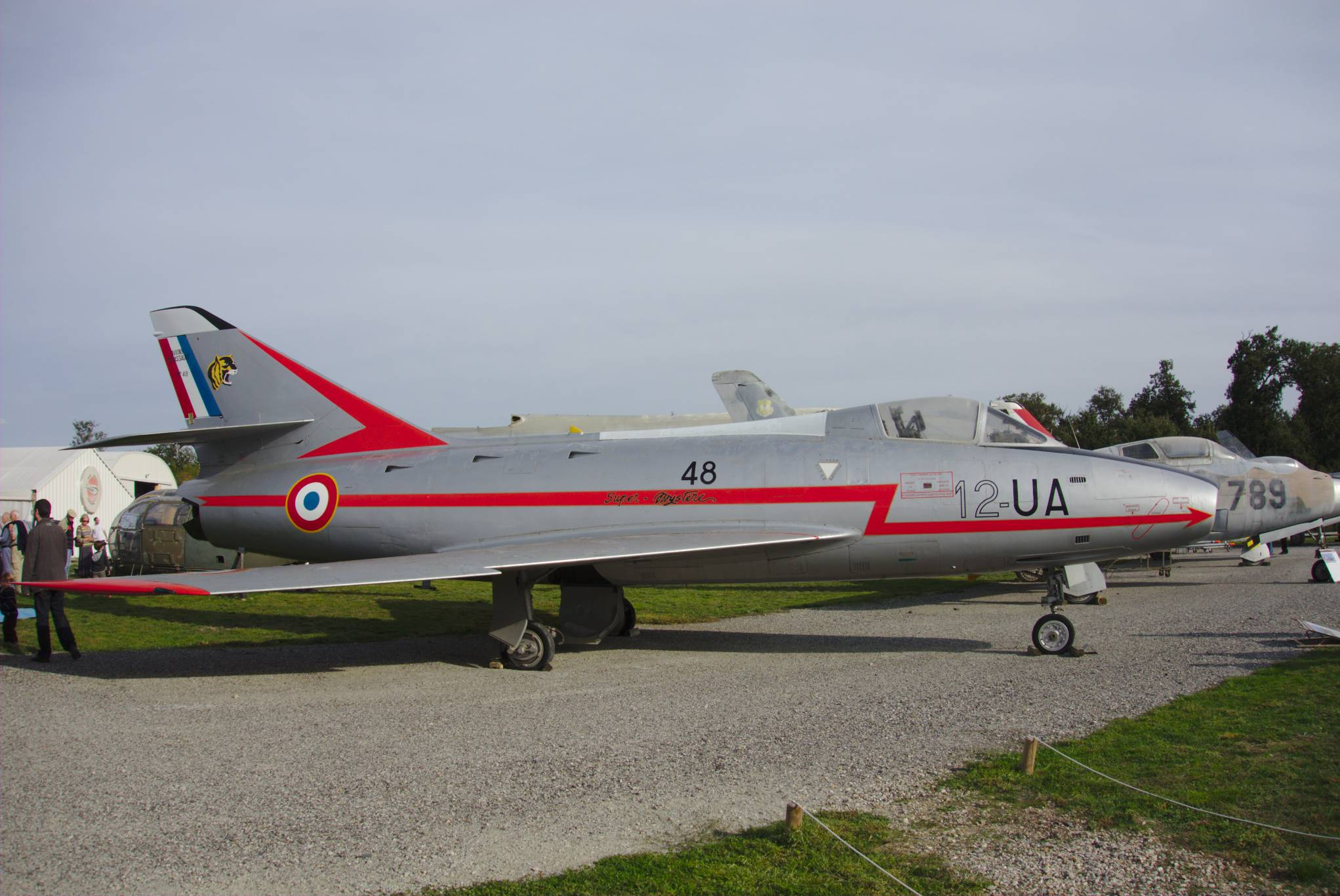 Dassault Super Mystère B2 au musée des ailes anciennes à Toulouse (France) aux couleurs de la 12e escadre de chasse, escadrille SPA 162 "Le tigre".